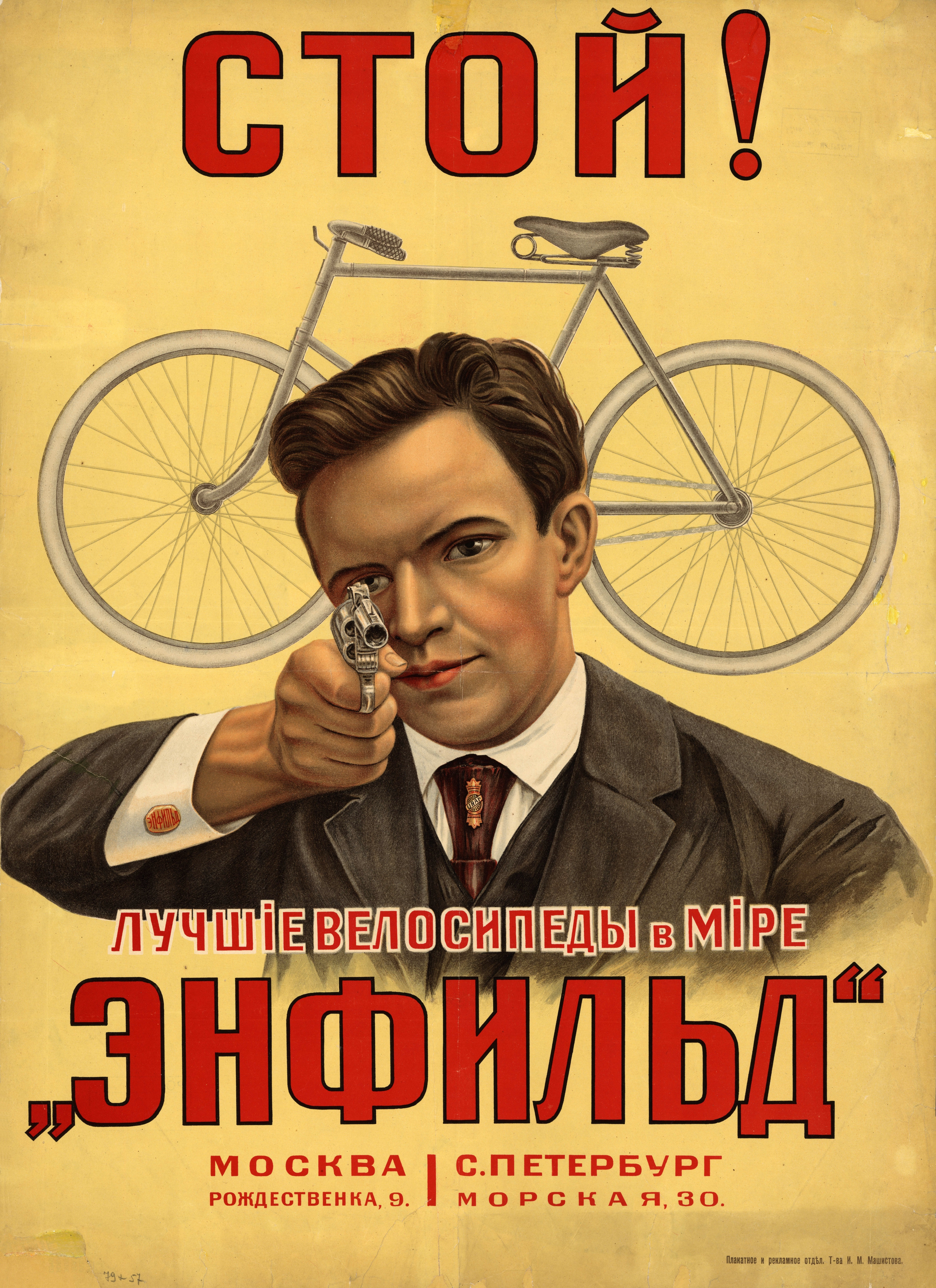 Русский дореволюционный рекламный плакат. Библиографическая ссылка:Стой! Лучшие велосипеды в мире «Энфильд» [изоматериал] : [плакат]. — [Москва] : Плакатное и рекламное отдел. Т-ва И. М. Машистова, [1900—1910-е гг.]. — 1 л. : хромолитография ; 79 × 57 см.